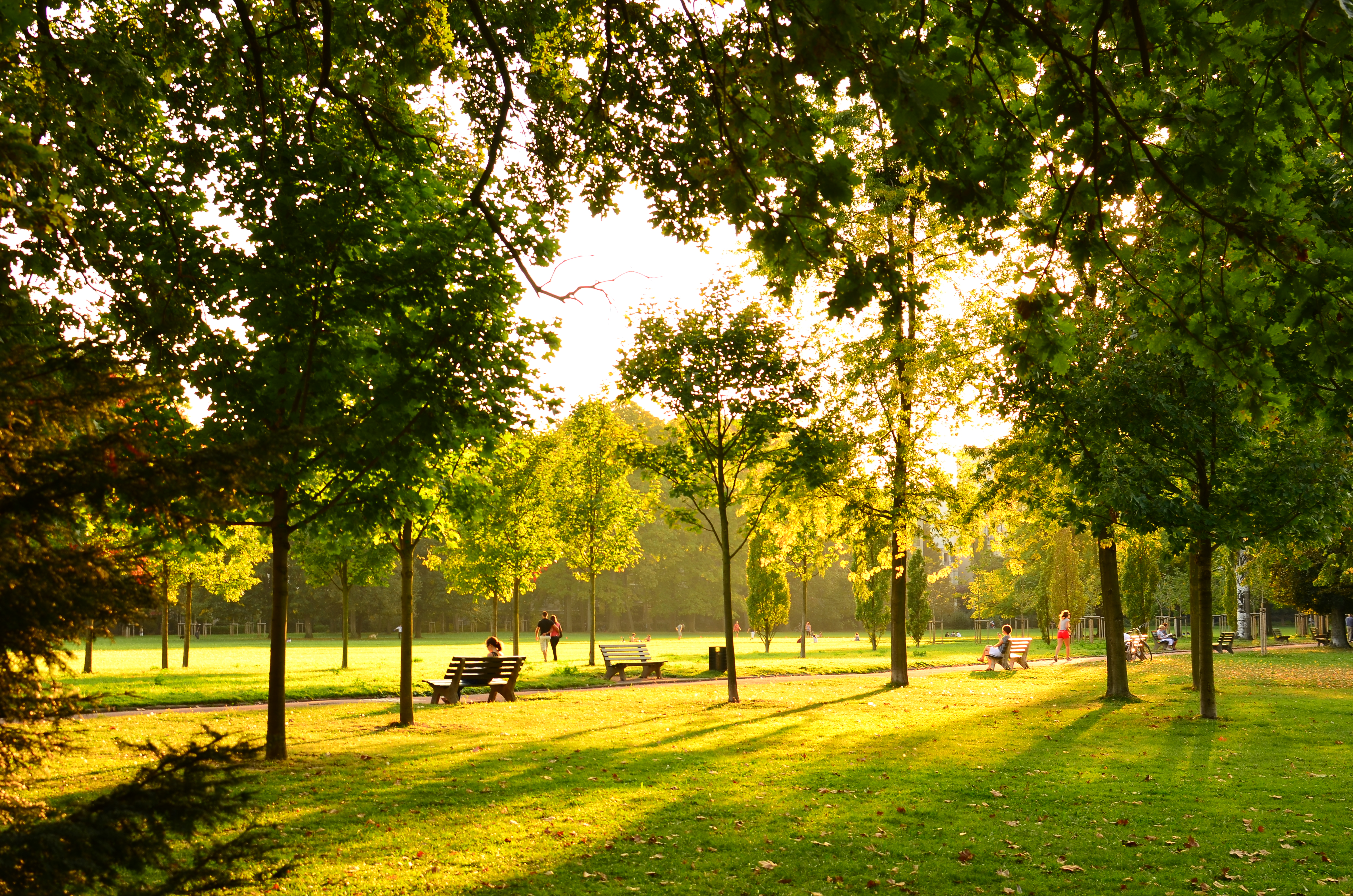 Parc de la Tête d'Or de Lyon - Vue des pelouses de la coupole